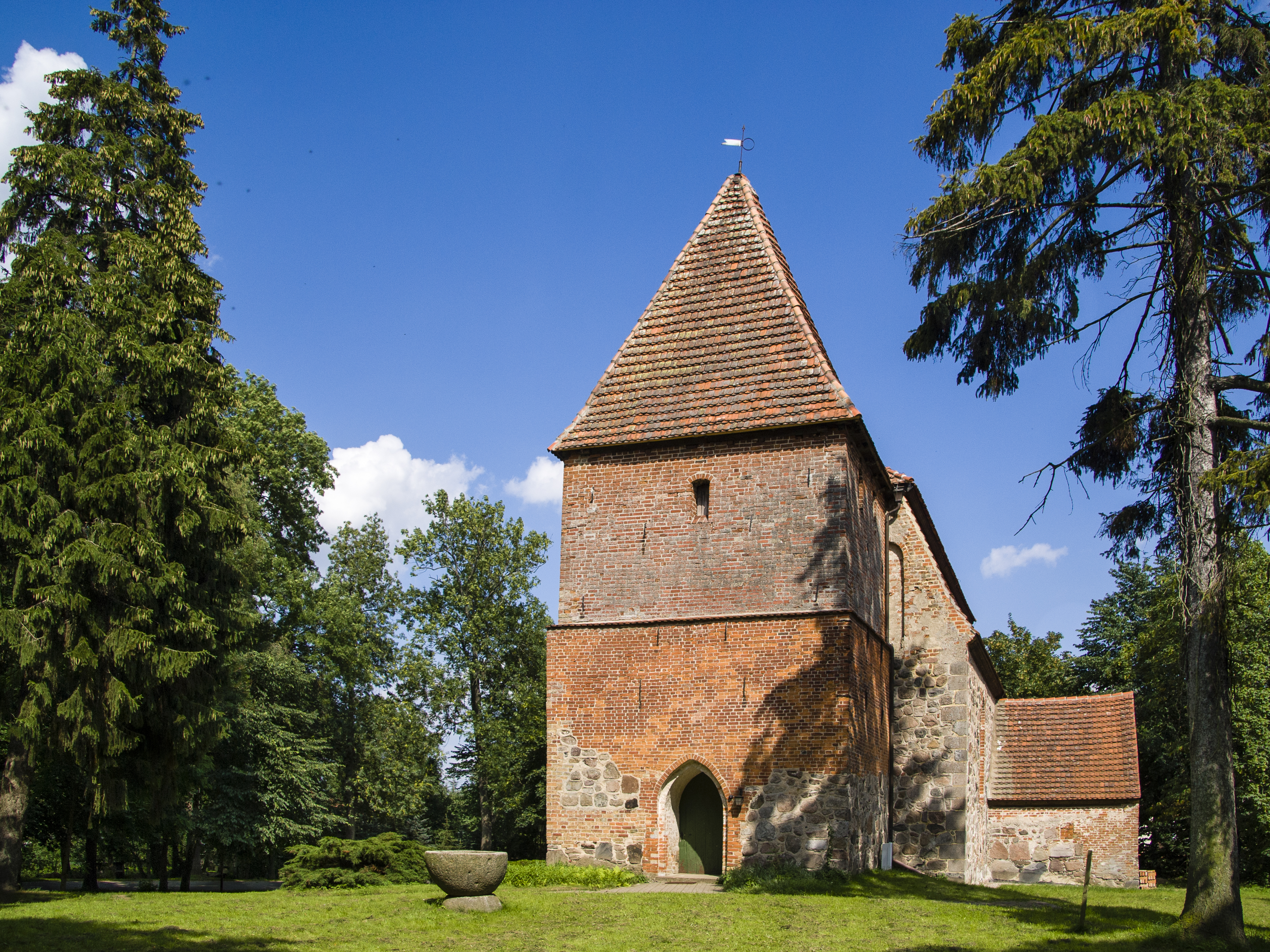 Dorfkirche Moisall - Ostansicht